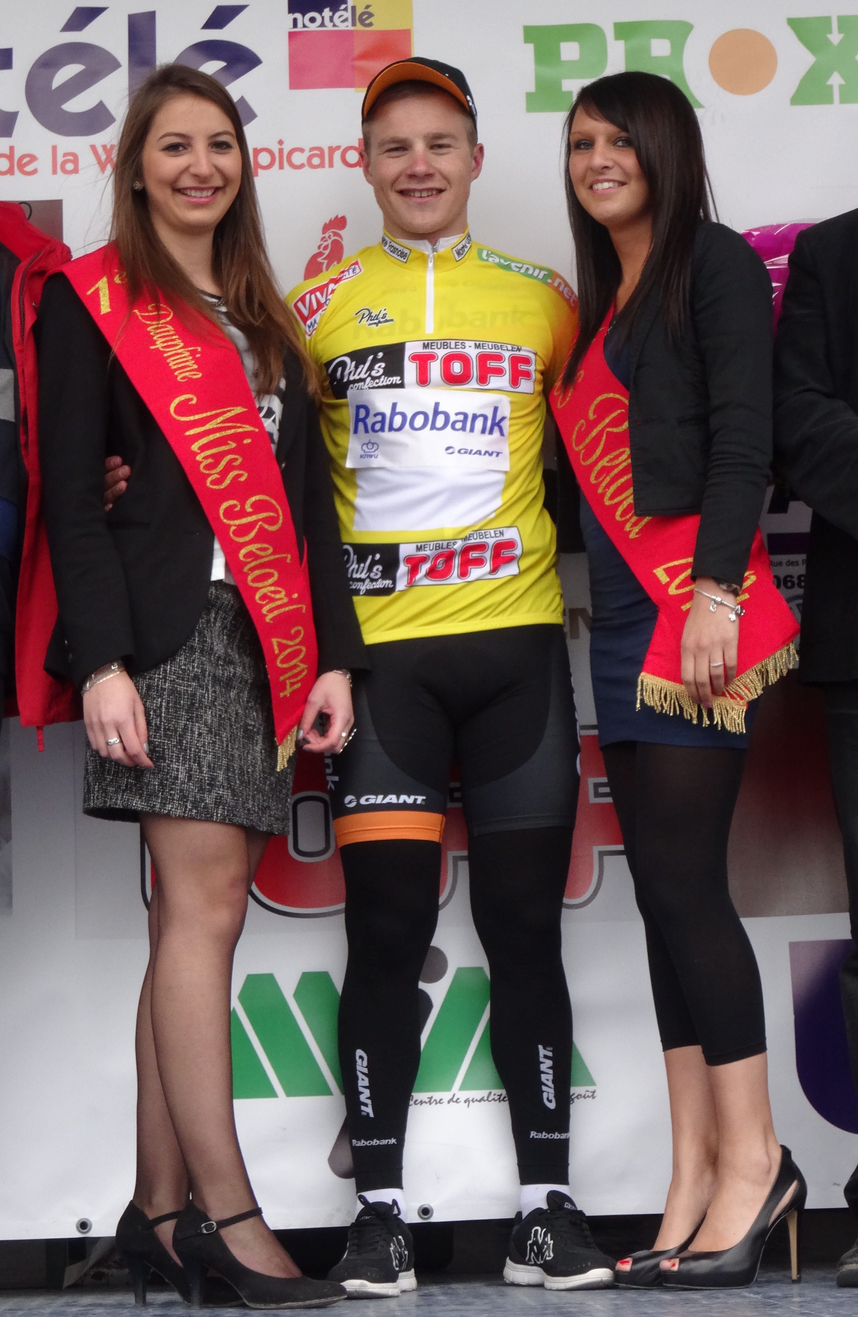 Triptyque des Monts et Châteaux 2014, étape 1, 4 avril 2014, arrivée à Quevaucamps. Depicted person: André Looij Depicted team: Rabobank Development no fallback page found for autotranslate (base=By courtesy of Triptyque des Monts et Châteaux 2014, lang=en)